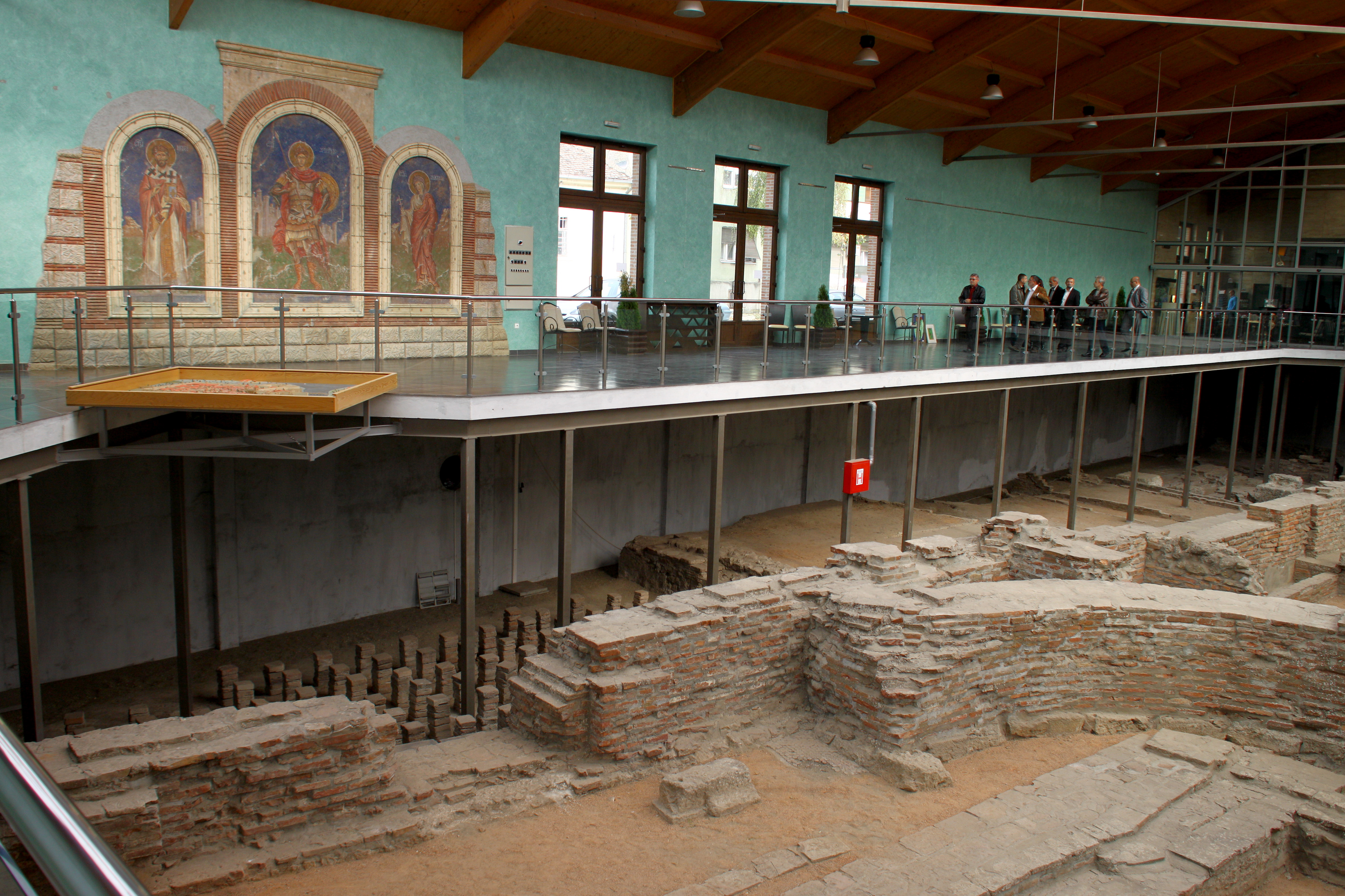 Српски (ћирилица): Визиторски центар „Царска палата“, Сремска Митровица, Србија.